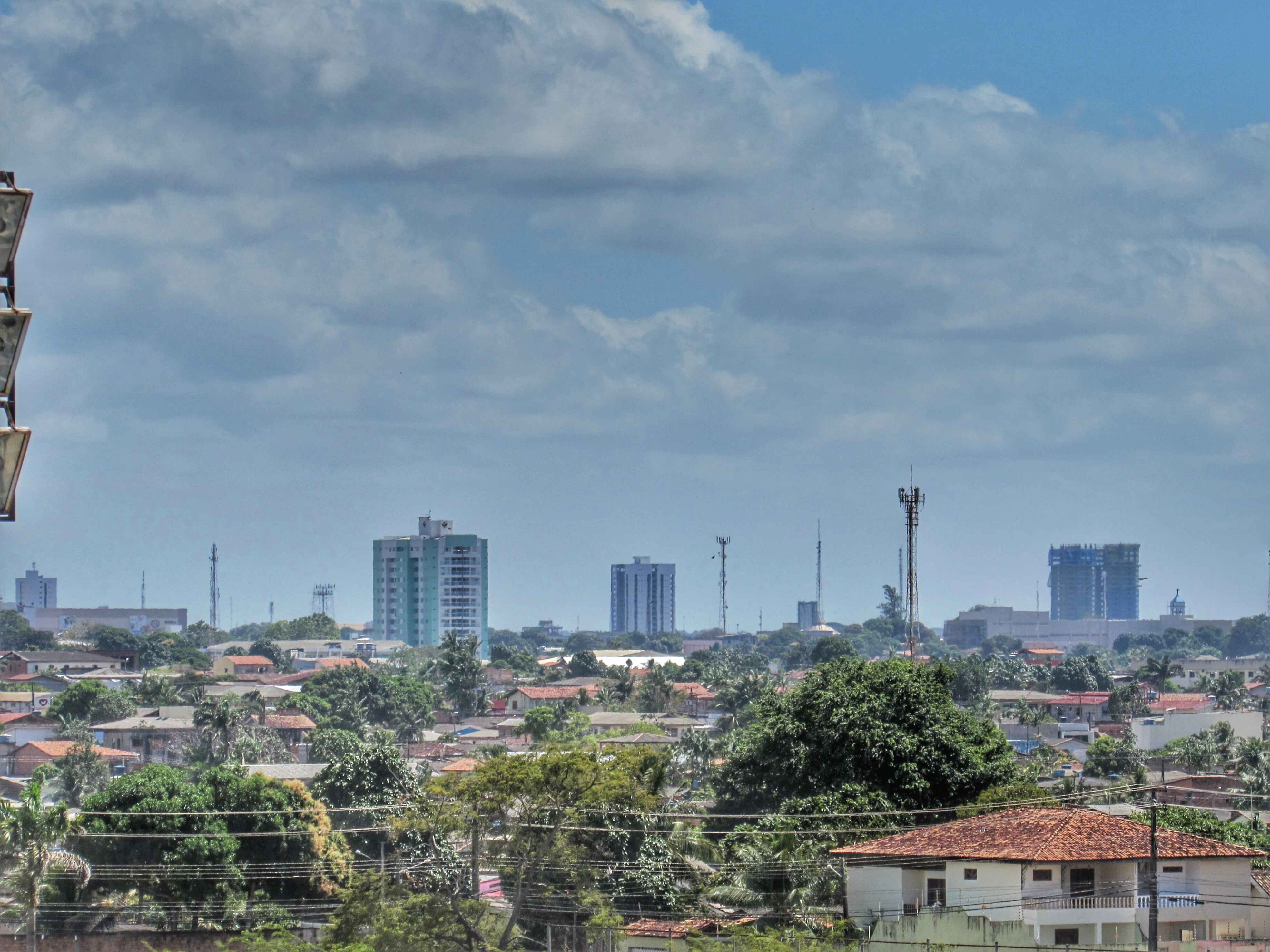 Verticalização no centro de Macapá